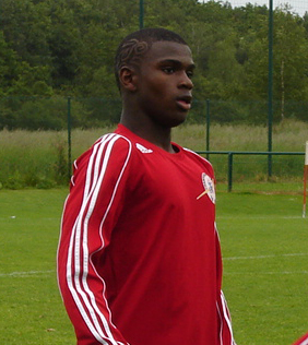 Abdoul Razzagui Camara